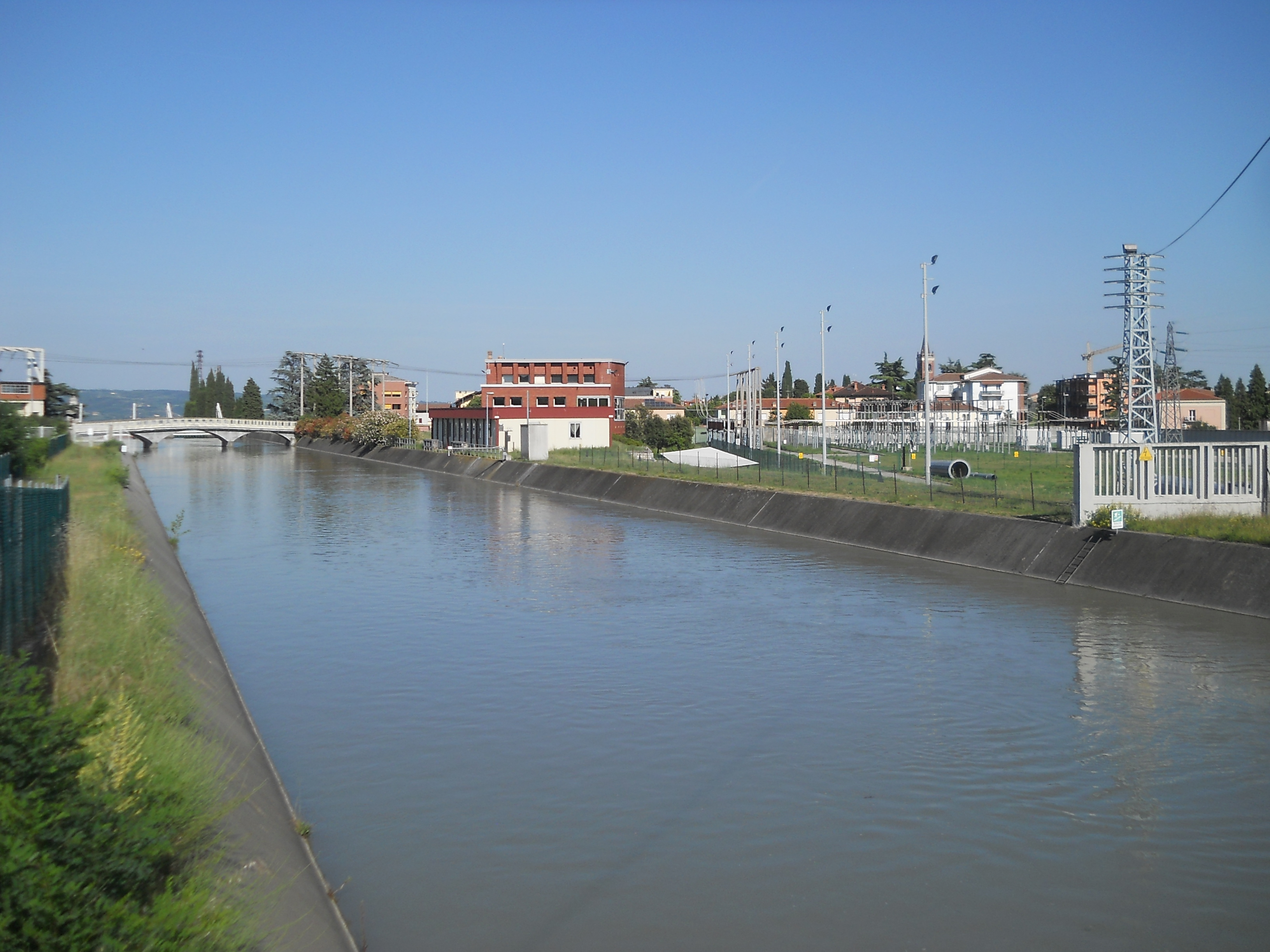 Il canale Biffis nei pressi della stazione idroelettrica di Bussolengo